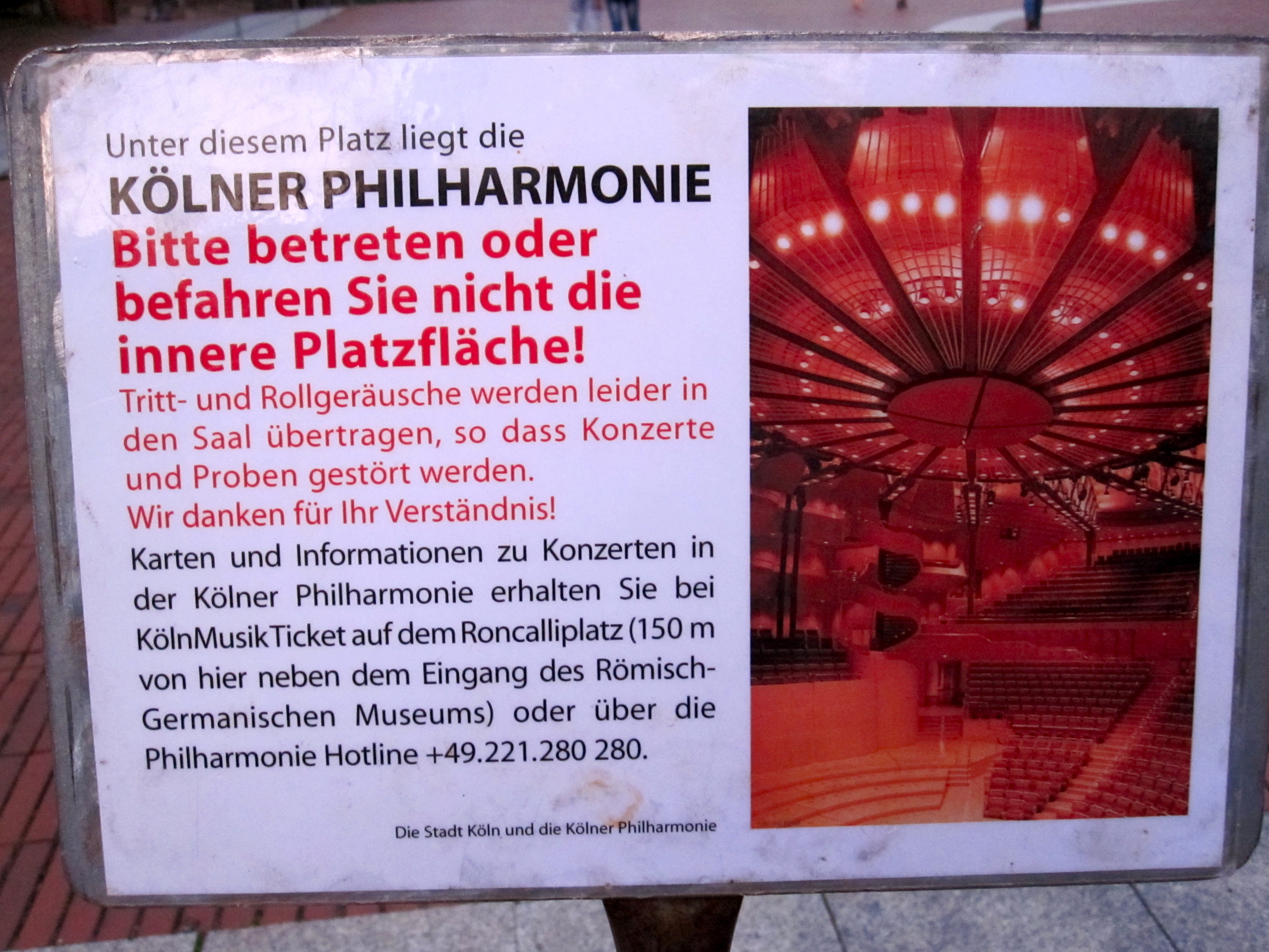 Schild auf dem Platz über der Kölner Philharmonie